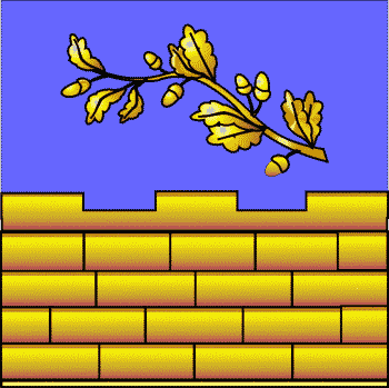 comte prefet